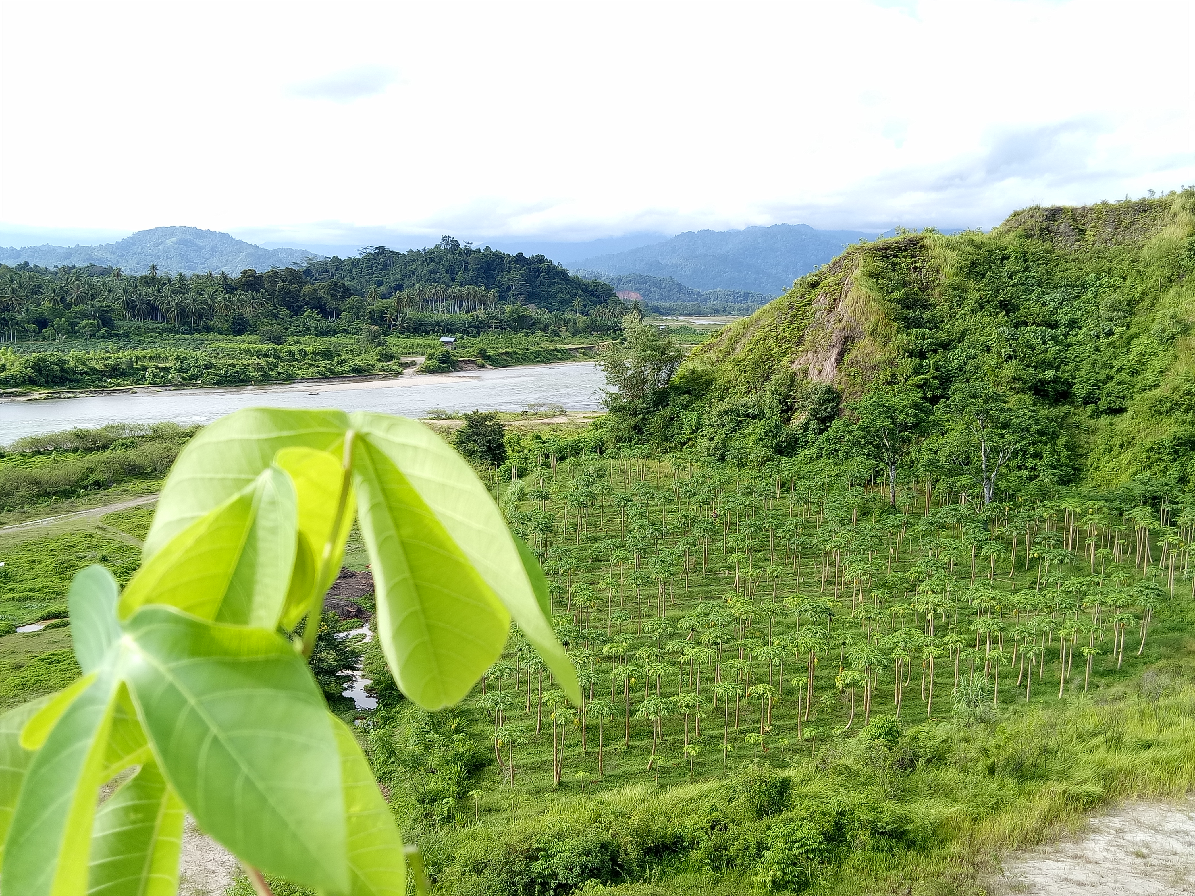 Dikenal dengan nama Puncak Lubuk Alung, daerah ini terletak di kanagarian Koto Buruak, kabupaten Padang Pariaman, Sumatra Barat. Wilayah ini merupakan tempat wisata alam baru di Kabupaten Padang Pariaman yang menampilkan pemandangan sungai batang anai dengan deretan bukit-bukit yang masih asri serta perkebunan pepaya dan sawah warga sekitar. Juga terdapat sebuah jembatan besar yang dikenal dengan nama Jembatan Panjang yang melintas diatas sungai batang anai yang menambah unik daerah wisata ini. Banyaknya latar pemandangan alam asri untuk mengabadikan momen dilokasi ini menjadi lebih menguntungkan dengan tempat yang terjangkau dari keramaian. Tempat ini juga berada di jalur menuju tempat wisata alam baru yang terkenal di Sumatra Barat yaitu Nyarai dan air terjun pelangi